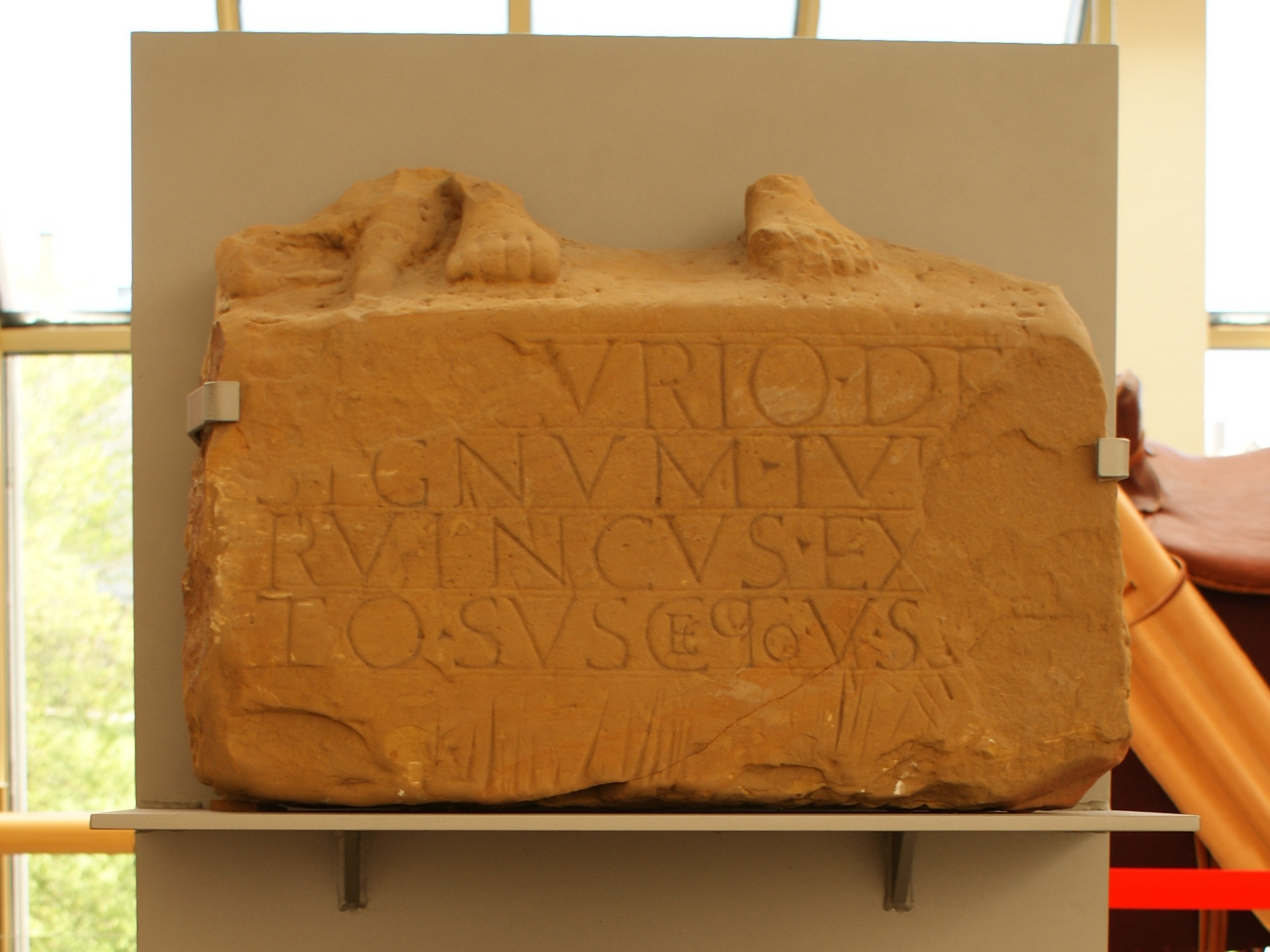 Basis der Merkurstatue aus dem Kastell Buch im Limesmuseum Aalen.